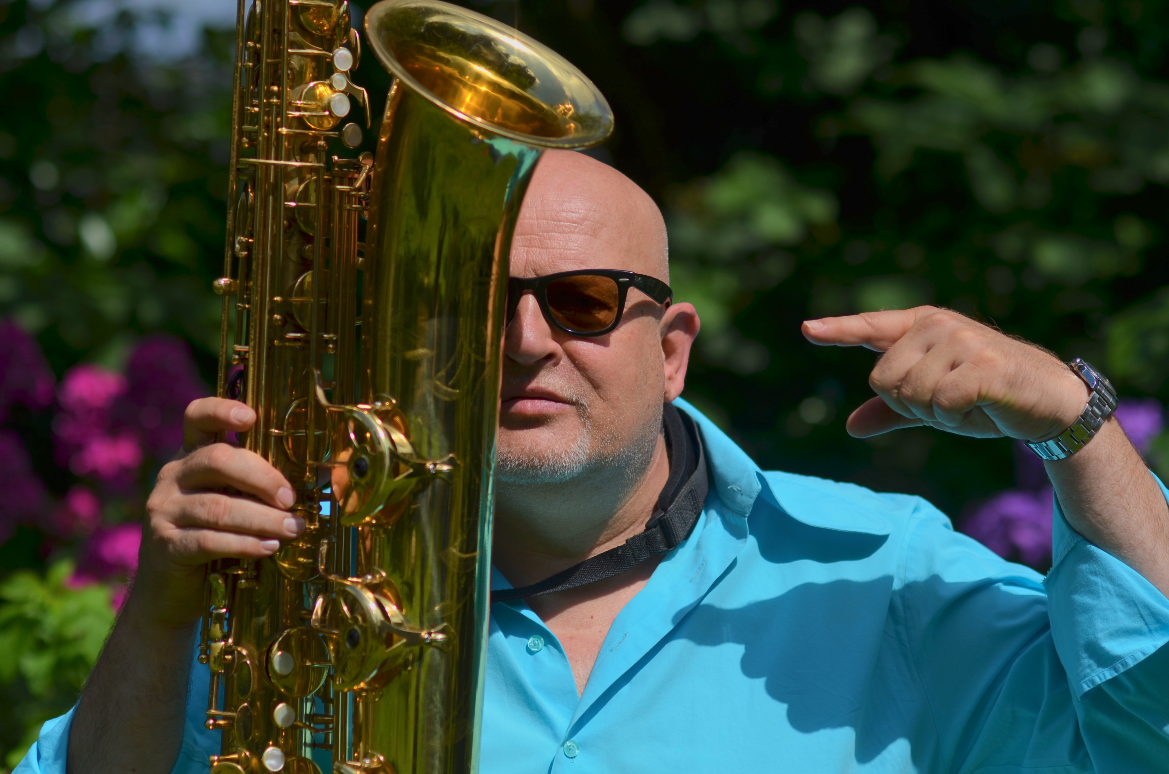 Bernd Delbrügge, Gartenkonzert Haan 2016